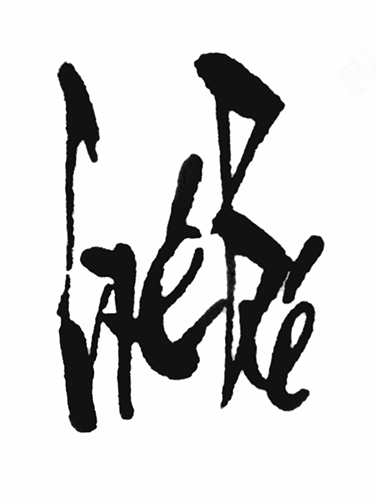 Signature de Gébé.